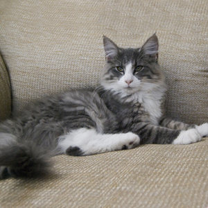 Gata azul de raza Bosque de Noruega propiedad del criadero Noldor*ES